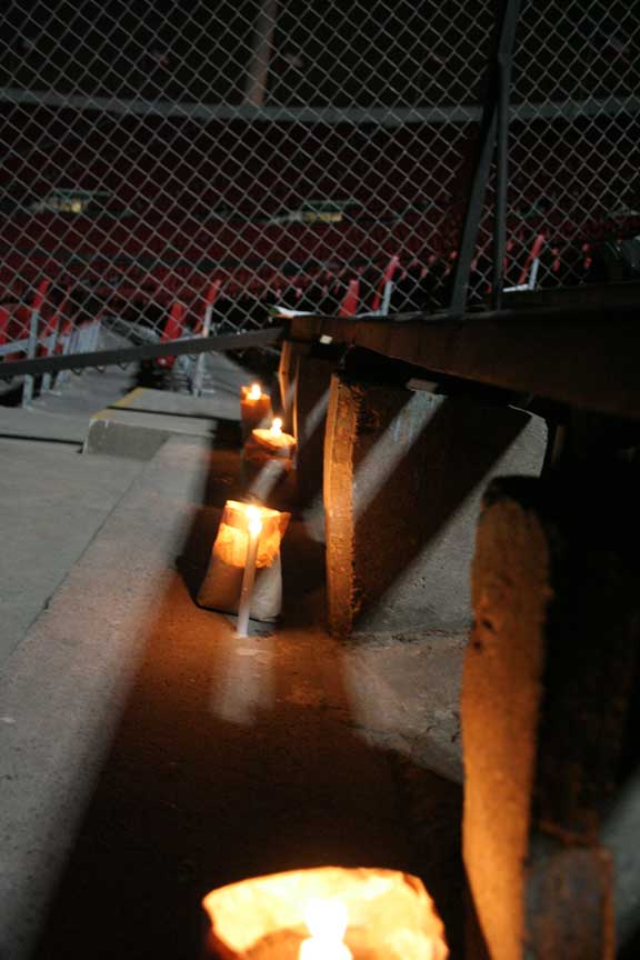 Interior de la Escotilla Nº8. Estadio Nacional. Chile.